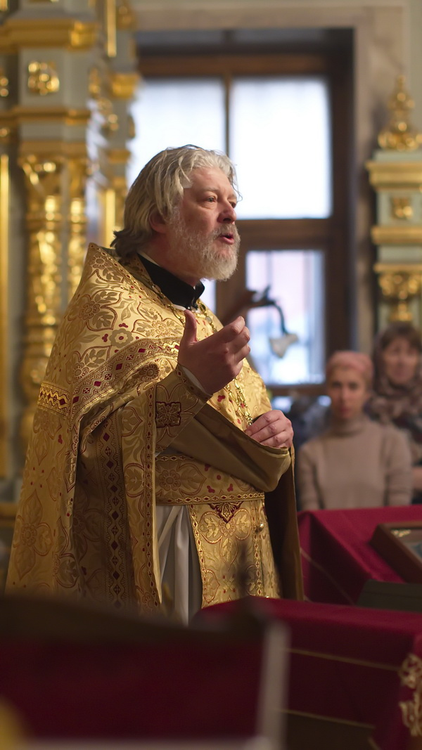 Протоиерей Алексей Уминский во время проповеди в храме святителя Николая в Котельниках